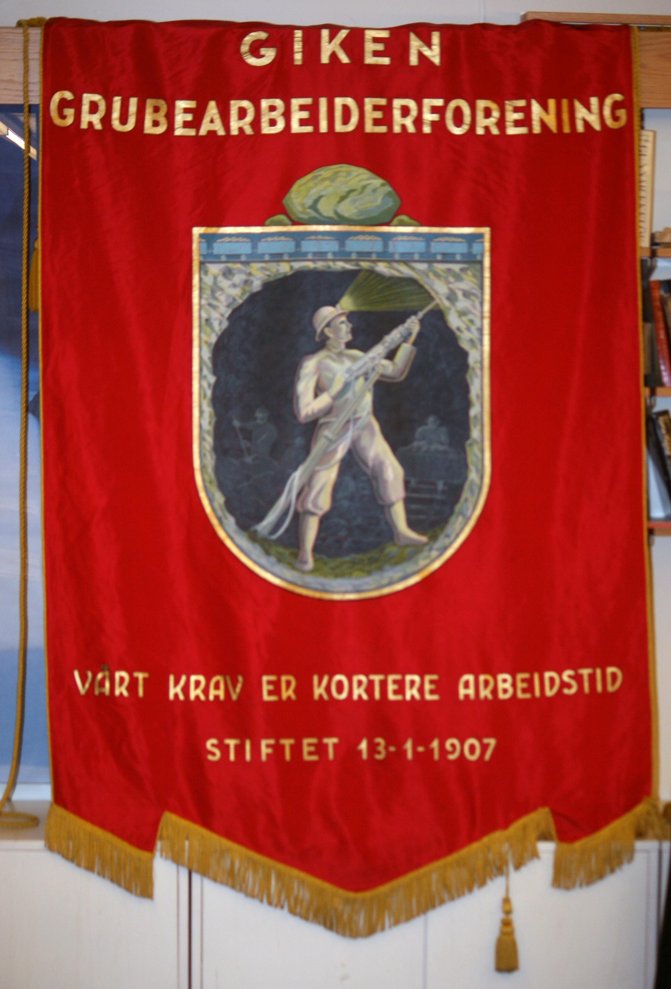 Fane utlånt fra fagforeningene i Sulitjelma i forbindelse med konferansen «100 år med åttetimersdag er nok – sekstimersdag innen 2018!» i Oslo 1. mars 2013. Fotokreditering: sekstimersdagen.no